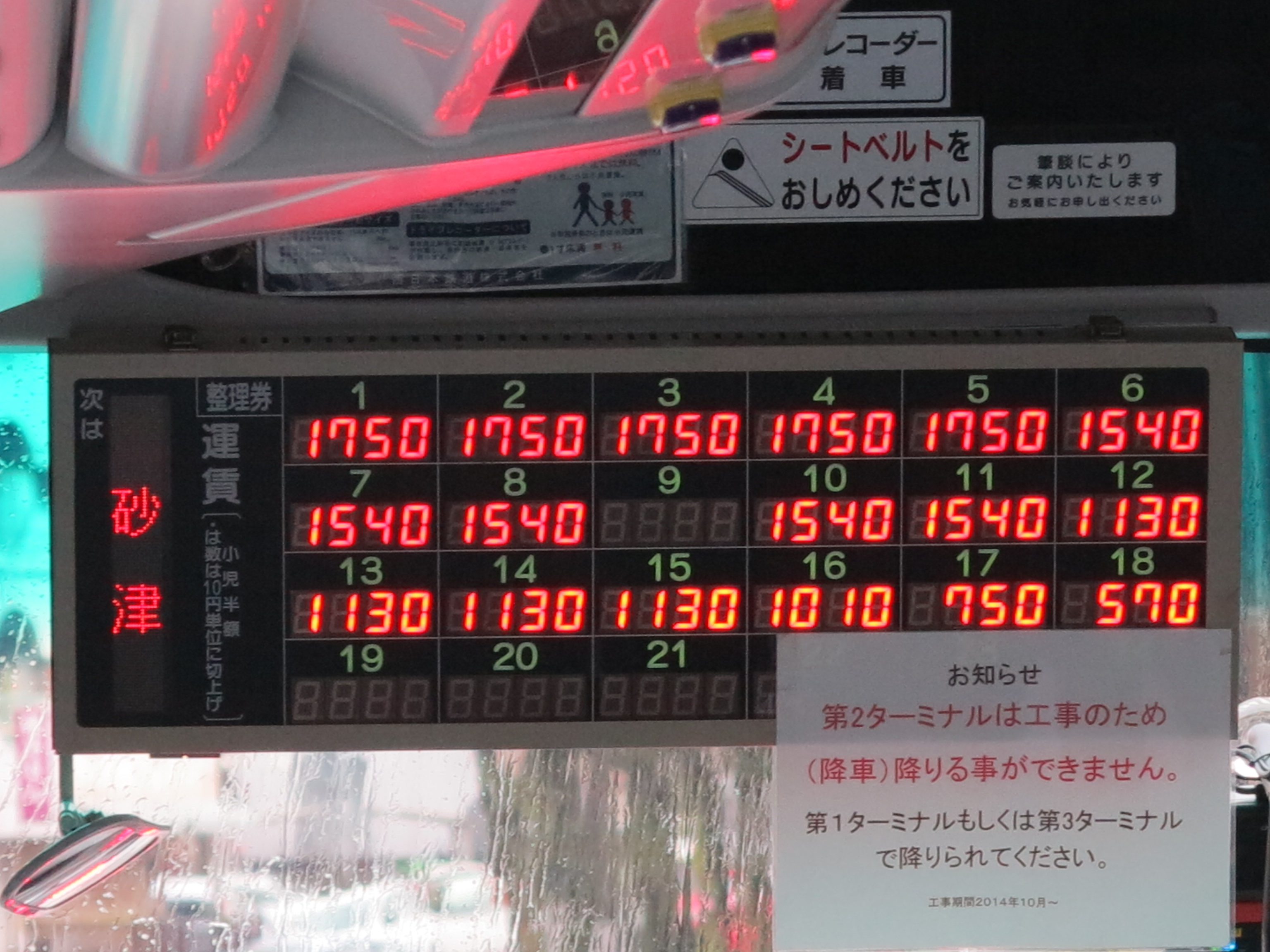 西鉄高速バス 砂津到着時の運賃表